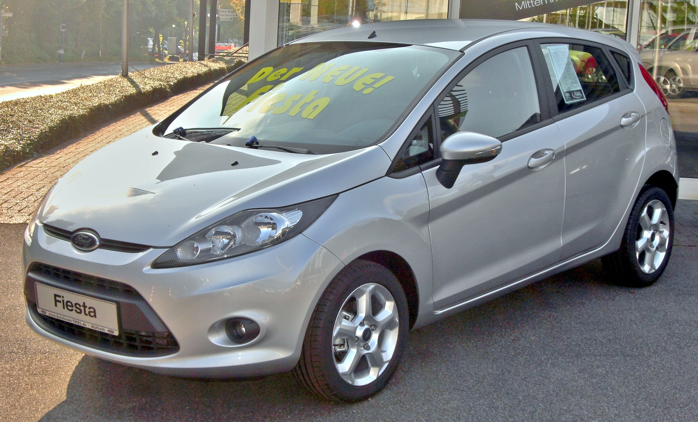 Ford Fiesta MK6 (2008) „Trend“